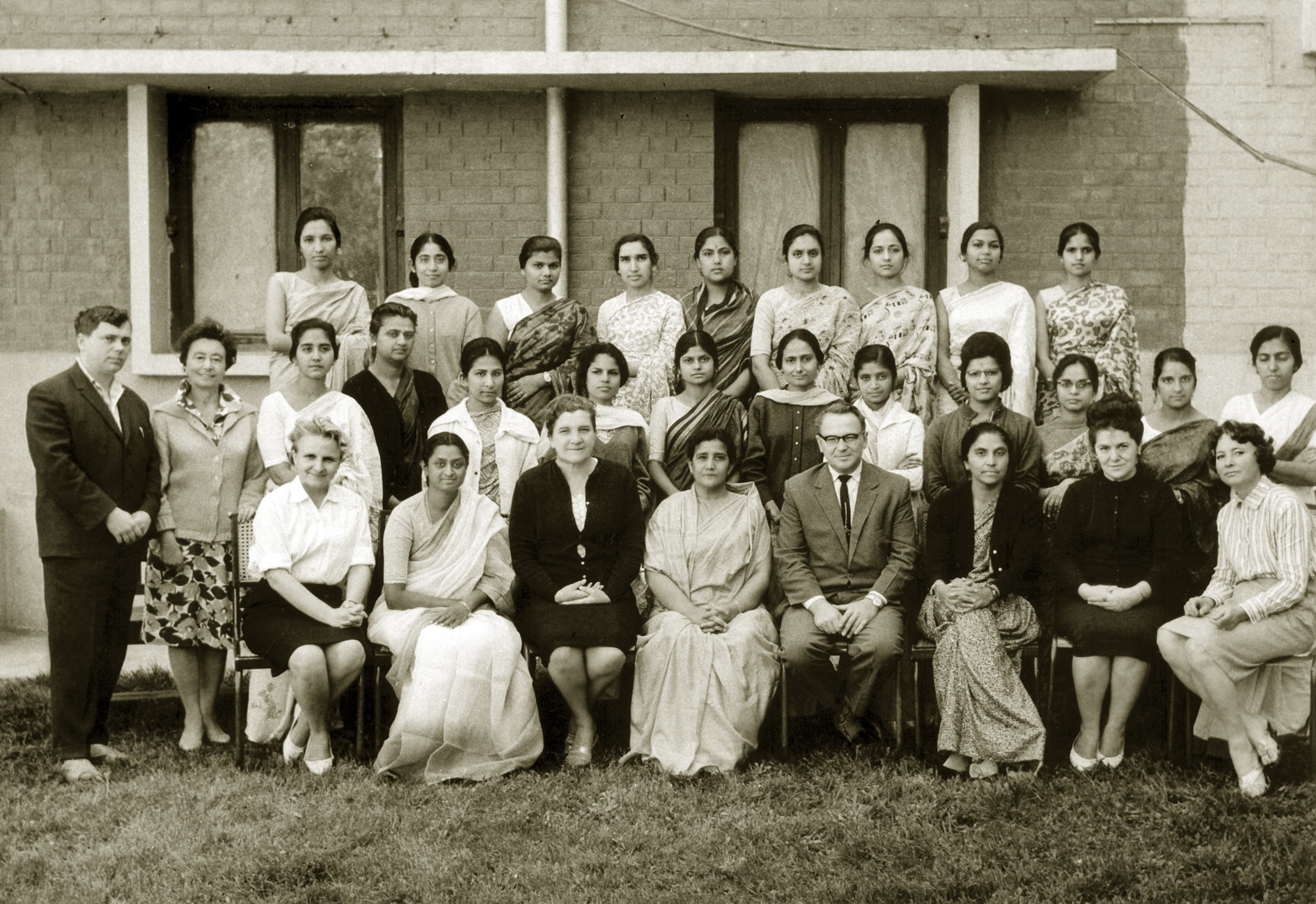 Проректор ЛПМИ по научной работе, доцент Олег Феодосьевич Тарасов с индийскими коллегами